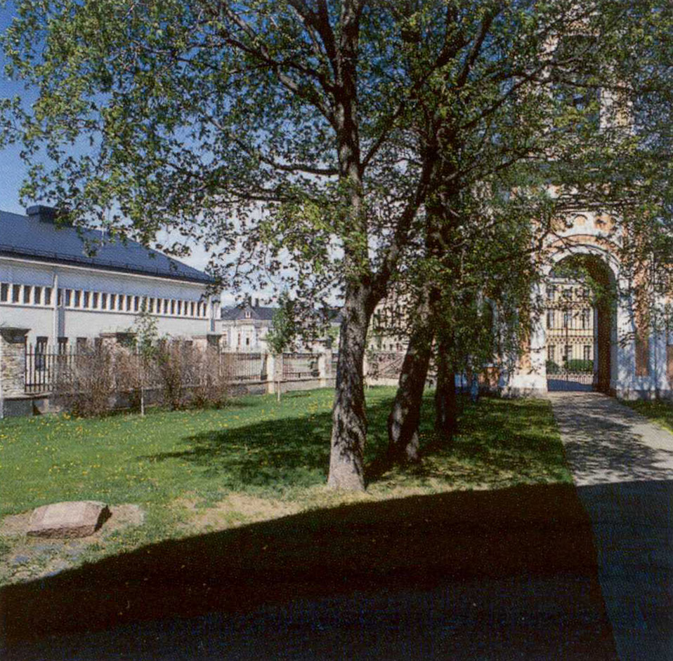 Haminan poliisi- ja oikeustalo. Kreikkalaiskatollisen kirkon pihalta nähtynä. Hamina, Finland.